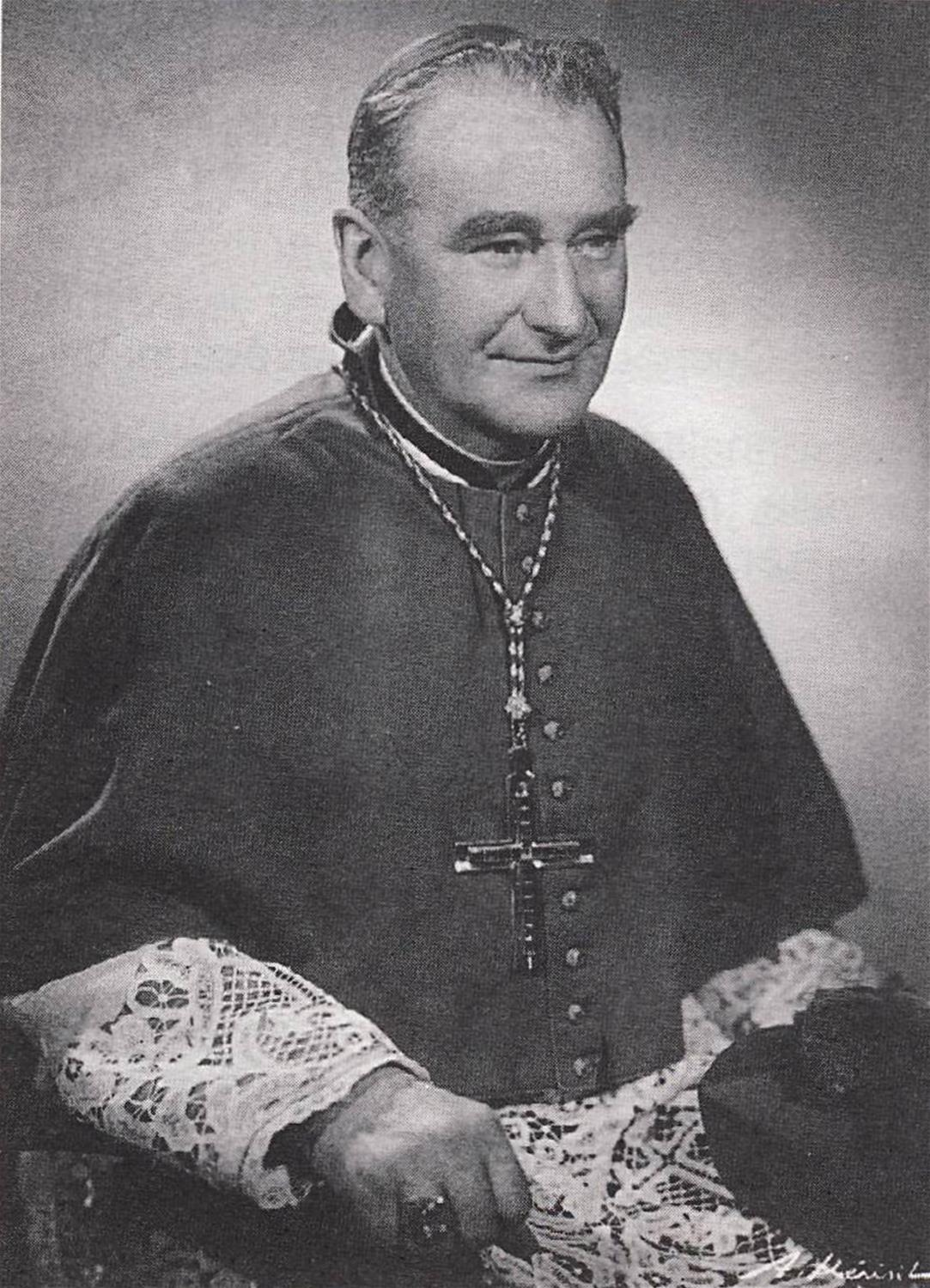 Mgr Vincent Favé, évêque titulaire d'Andeda et évêque auxiliaire de Quimper